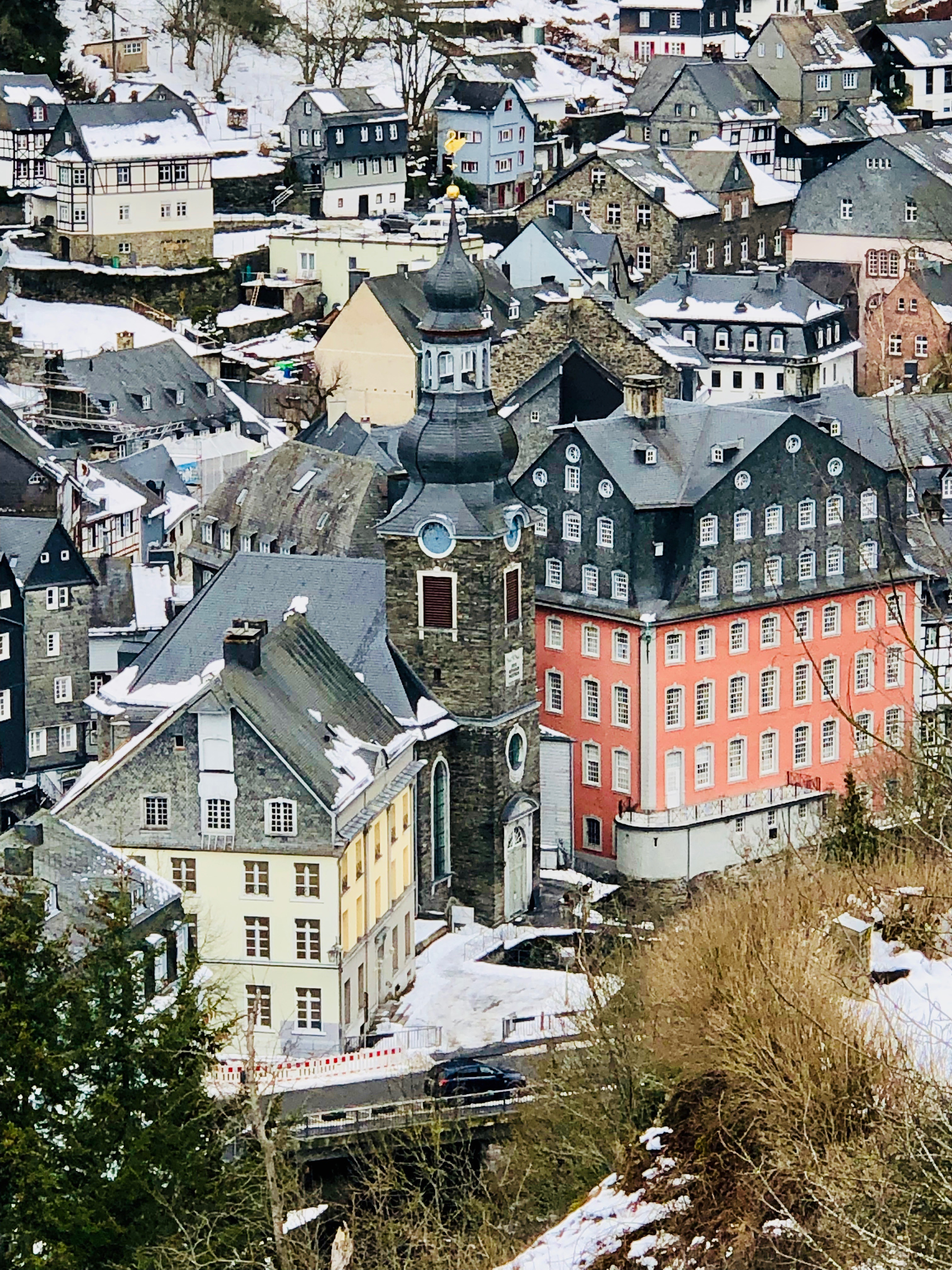 Die Stadtkirche mit dem Schlösser’schen Tuchmacherhaus (ehemaliges Pastorat; evangelisches Gemeindehaus) und Rotem Haus, vom Grindel aus gesehen